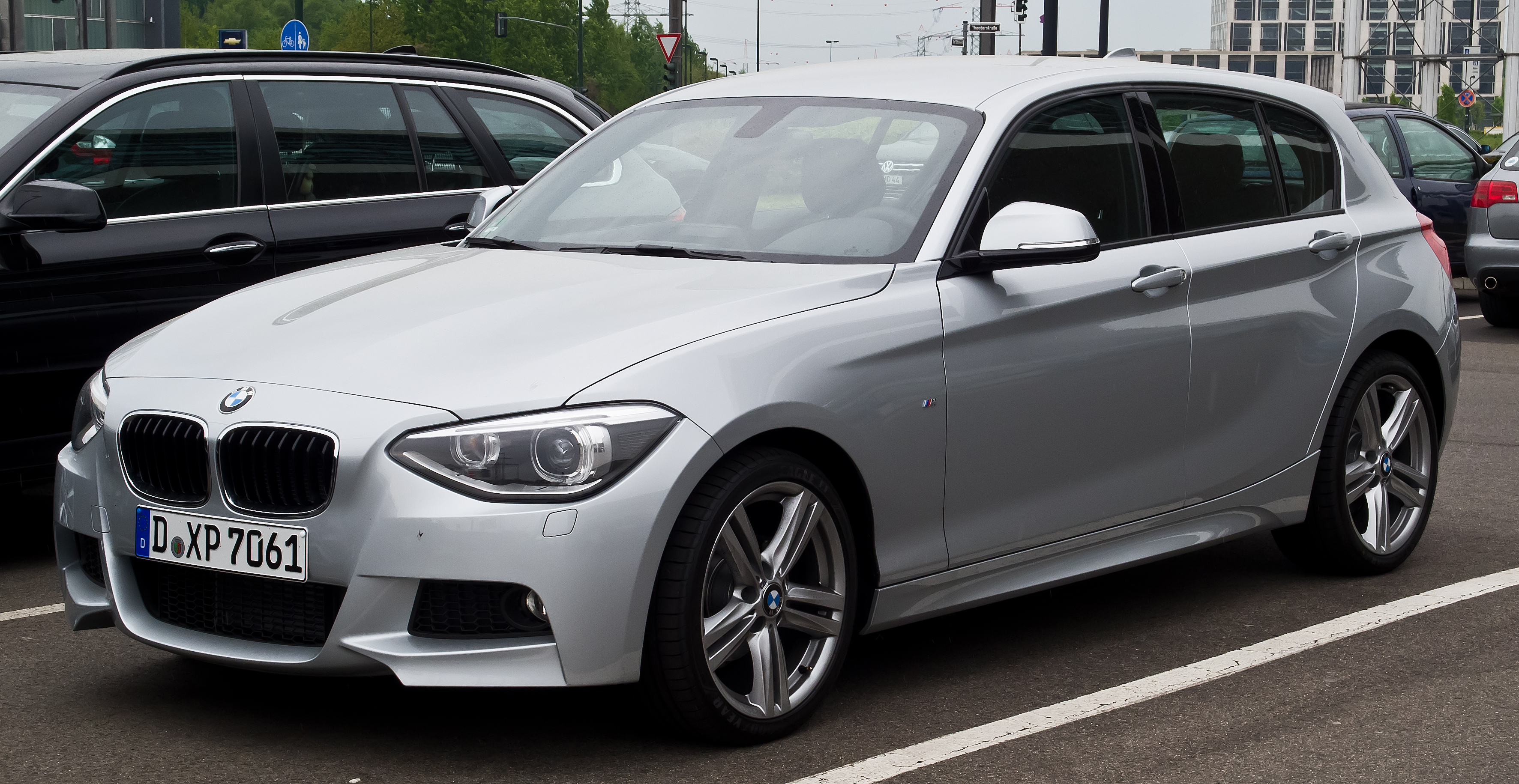 BMW 118d M-Sportpaket (F20)